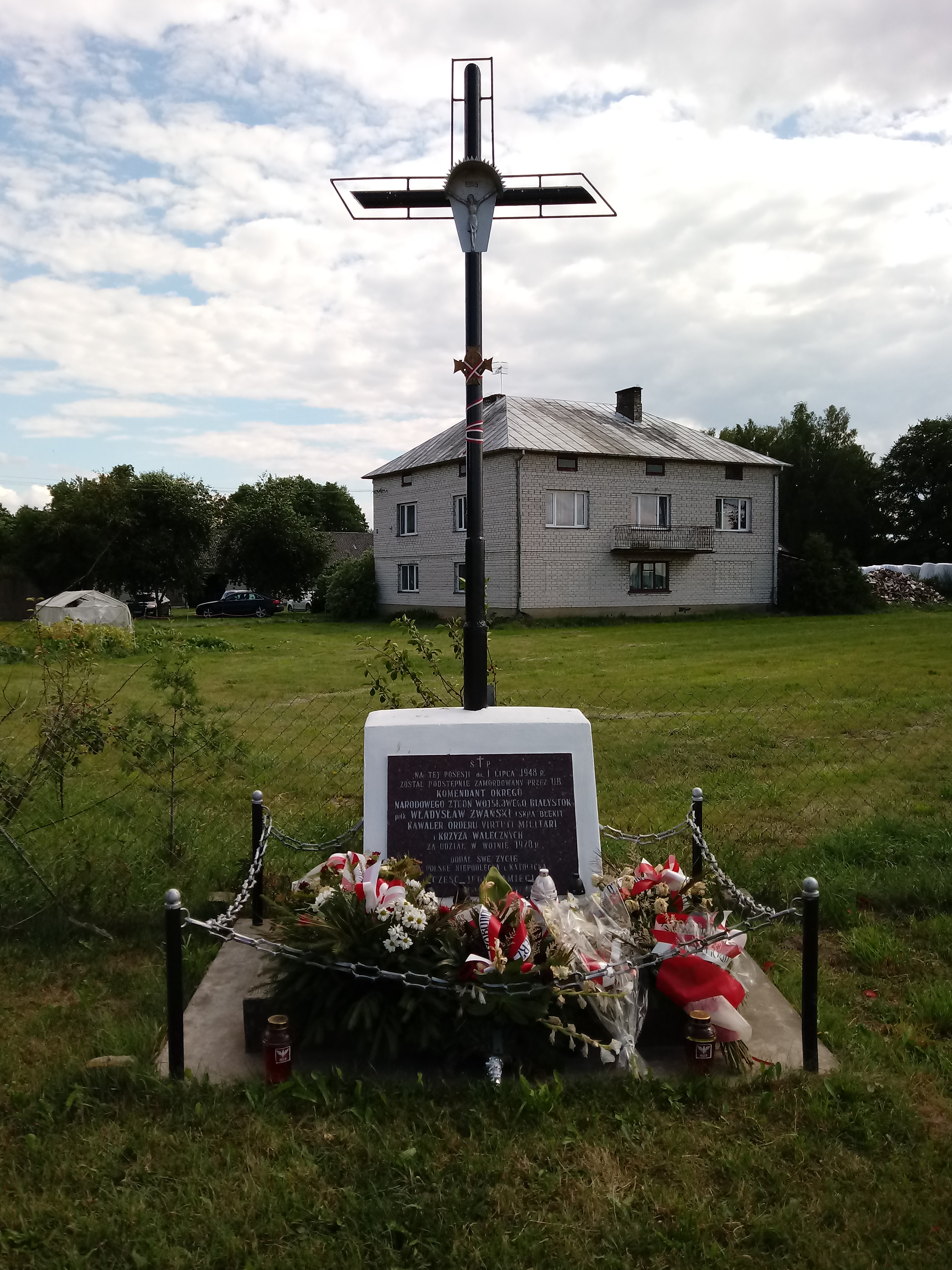 ppłk. Władysław Żwański ps. "Iskra", "Błękit", był ostatnim komendantem białostockiego okręgu Narodowego Zjednoczenia Wojskowego.